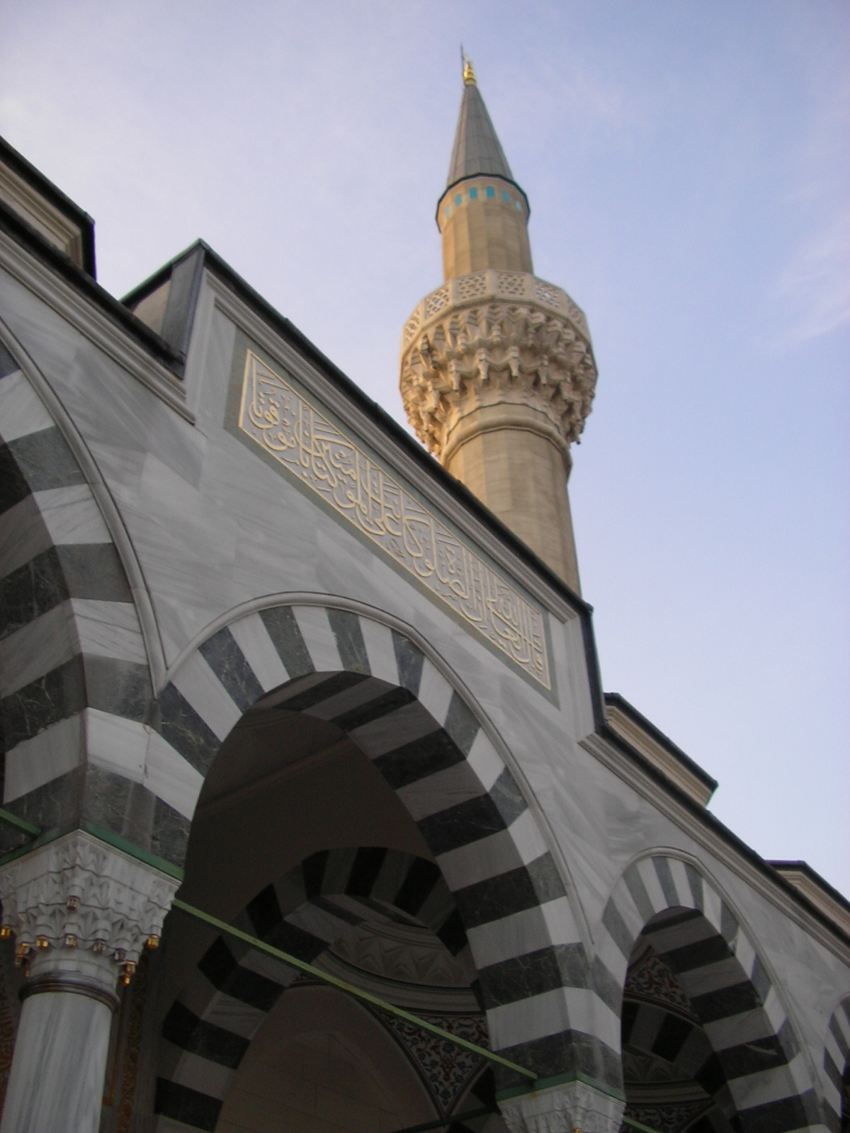 مأذنة ومدخل جامع طوكيو